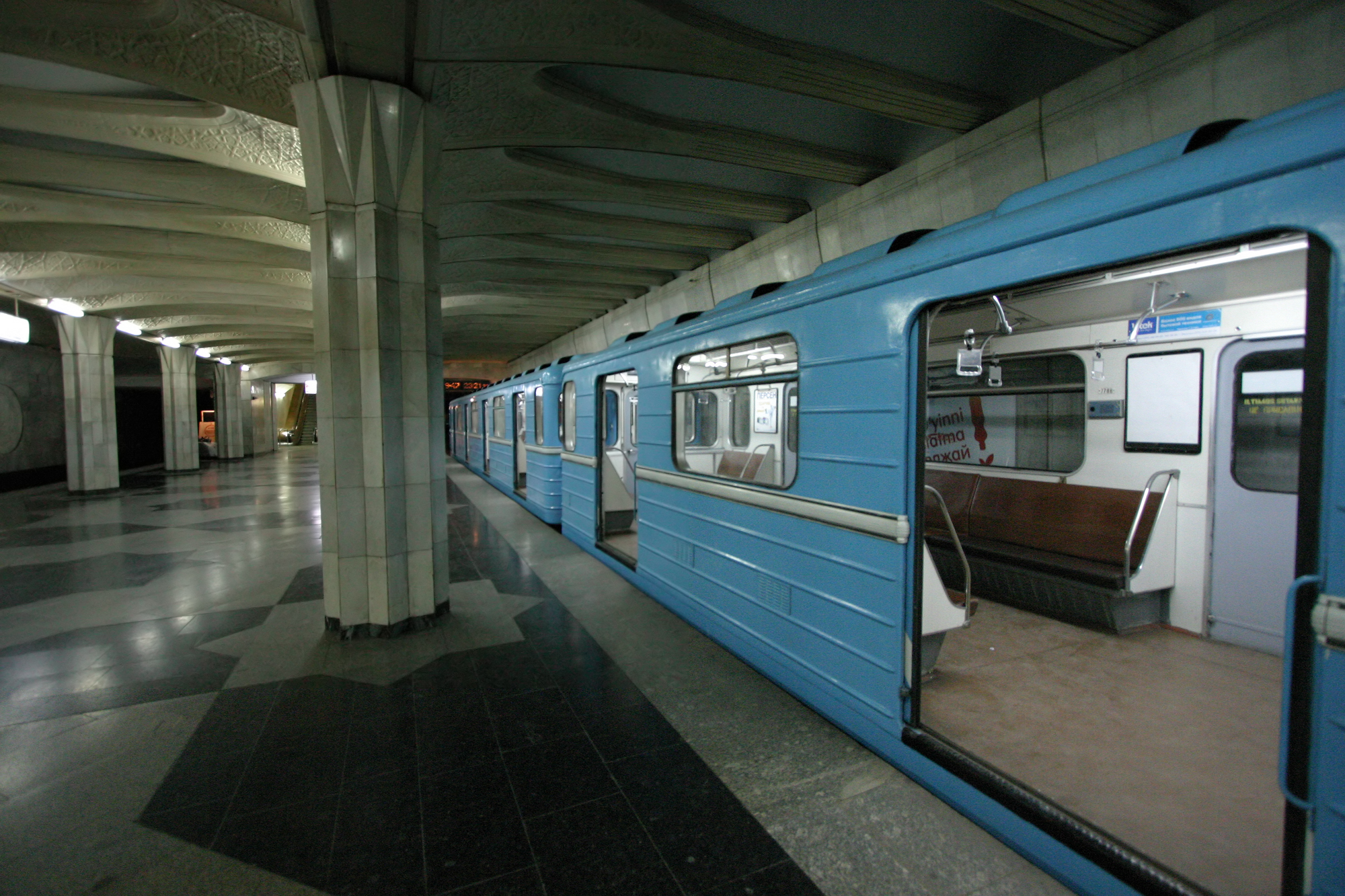 Metro Taschkent, Station „Völkerfreundschaft“ innen mit Wagen.